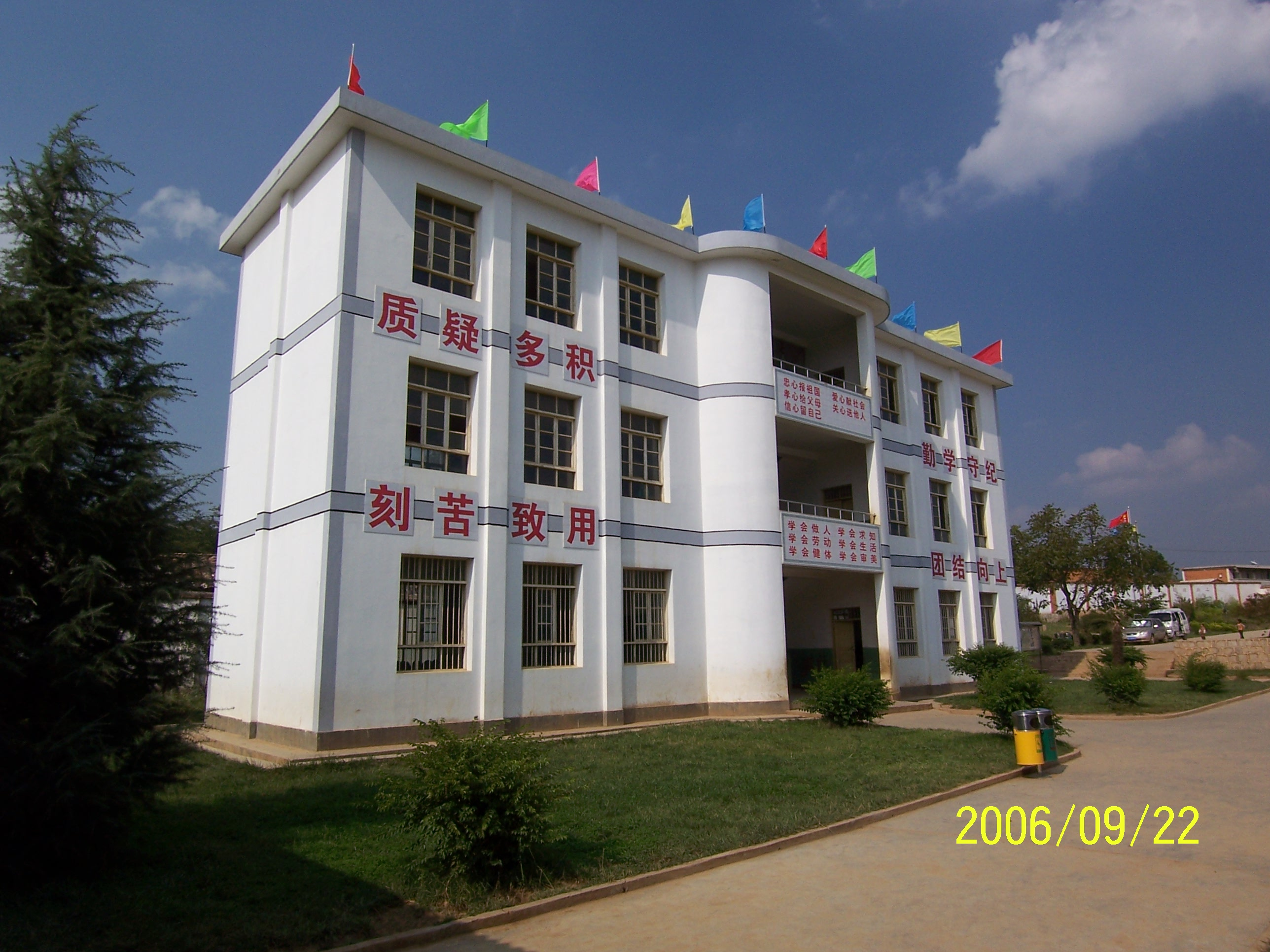 花鹿坪小学教学楼